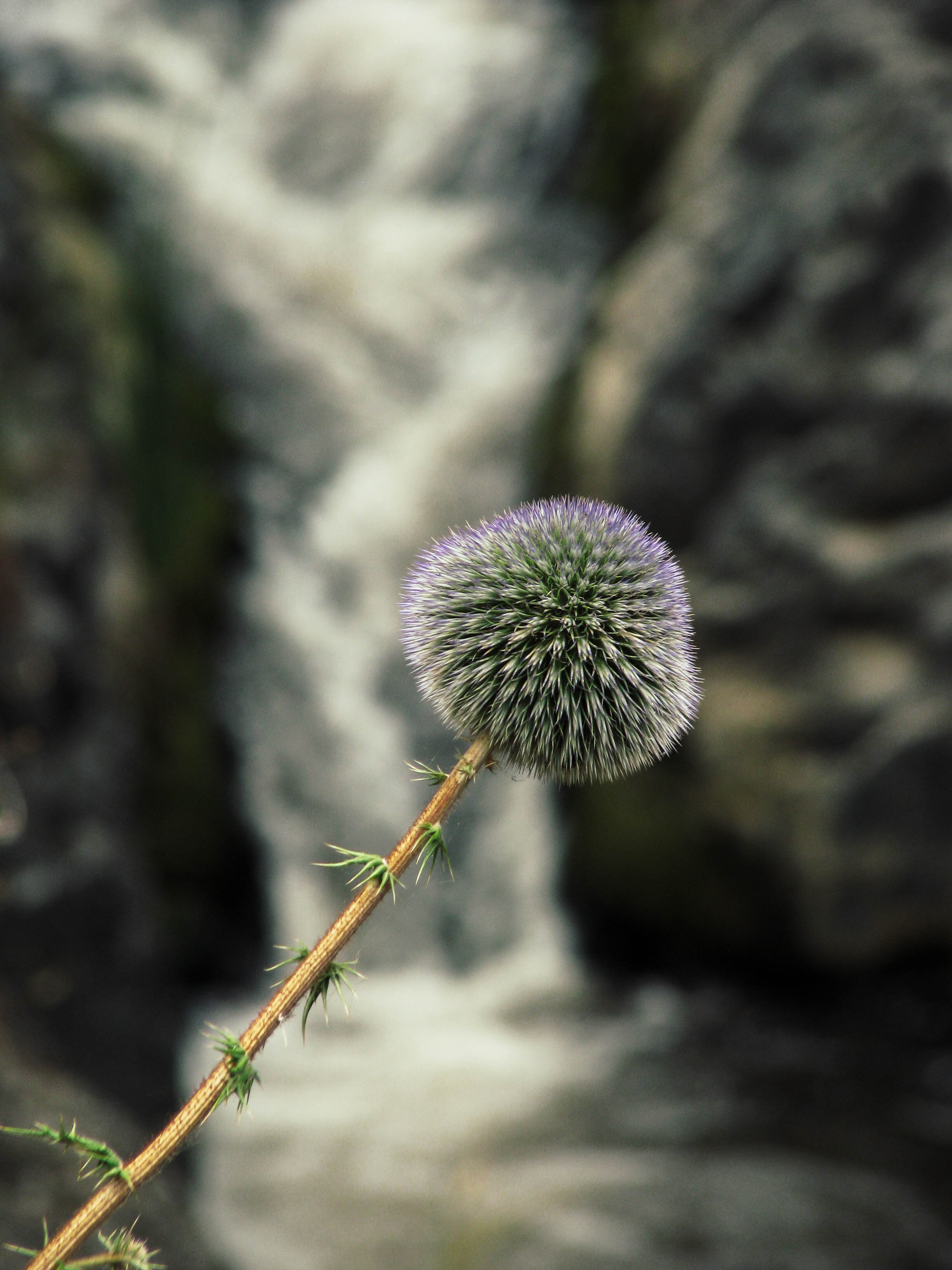 בערוץ נחל משושים אפשר לראות צמחי נחלים המאפיינים בתי גידול עשירים במים.